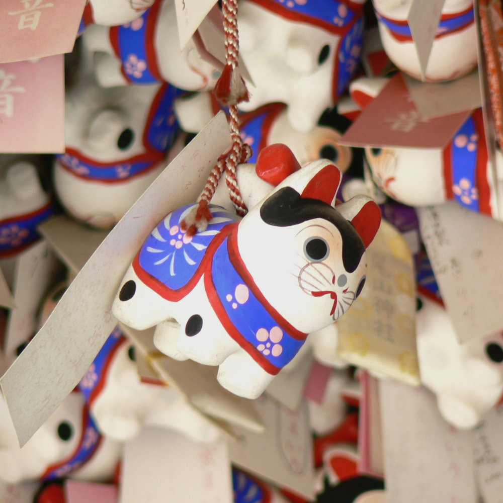 寺にかけられた張り子の犬。